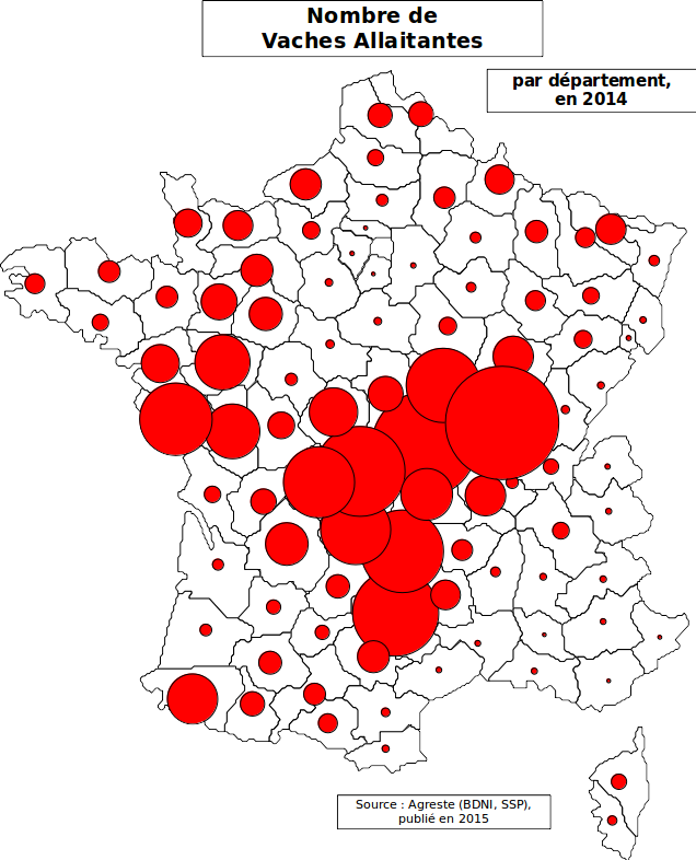 carte réalisée à partir de : Agreste (chiffres Identification bovine, SSP)